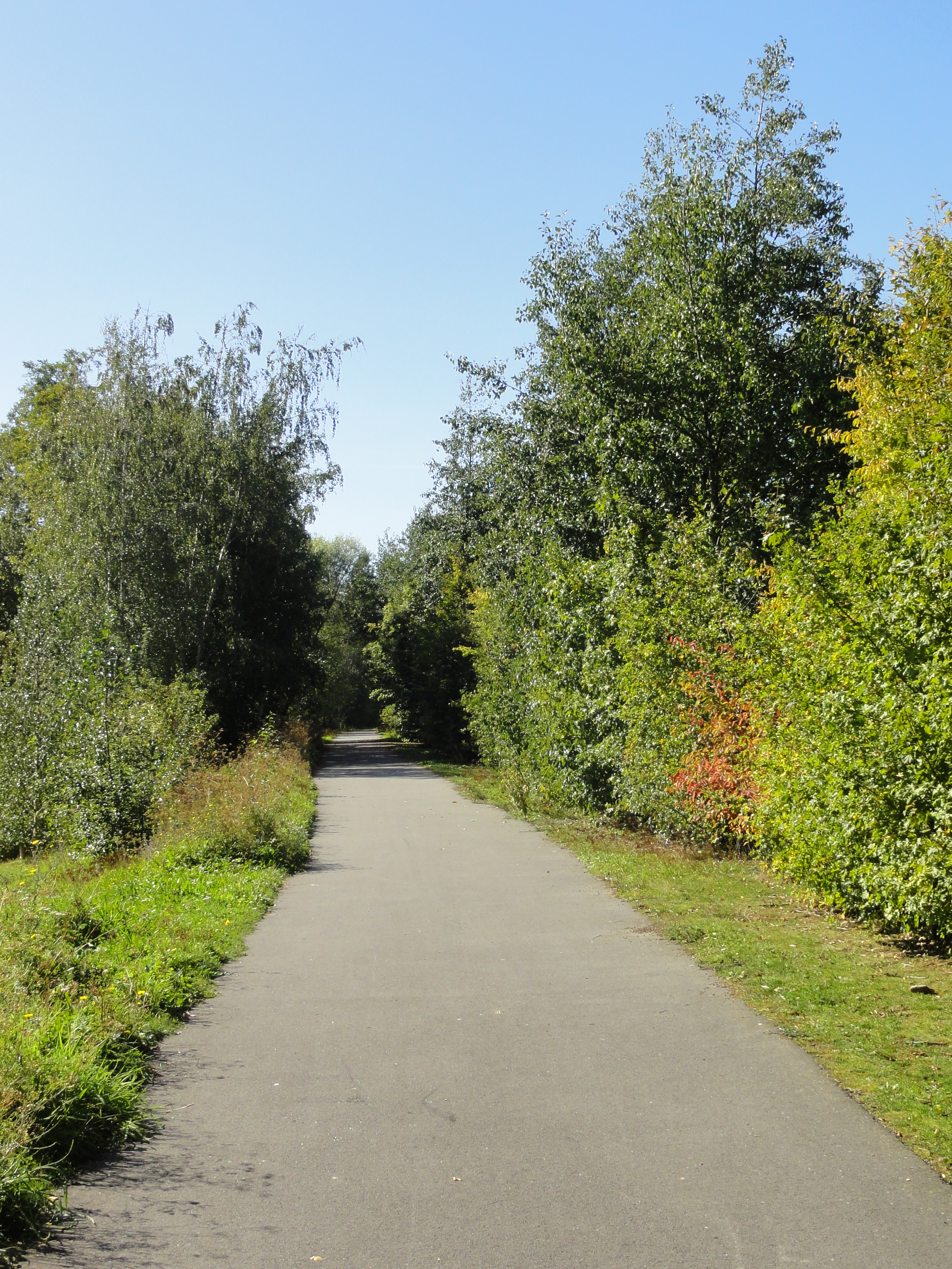 Terril n° 80B dit Cavalier Garennes Pont Ampère, fosse n° 3 - 3 bis - 3 ter de la Compagnie des mines de Liévin dans le bassin minier du Nord-Pas-de-Calais, Éleu-dit-Leauwette, Pas-de-Calais, Nord-Pas-de-Calais, France.